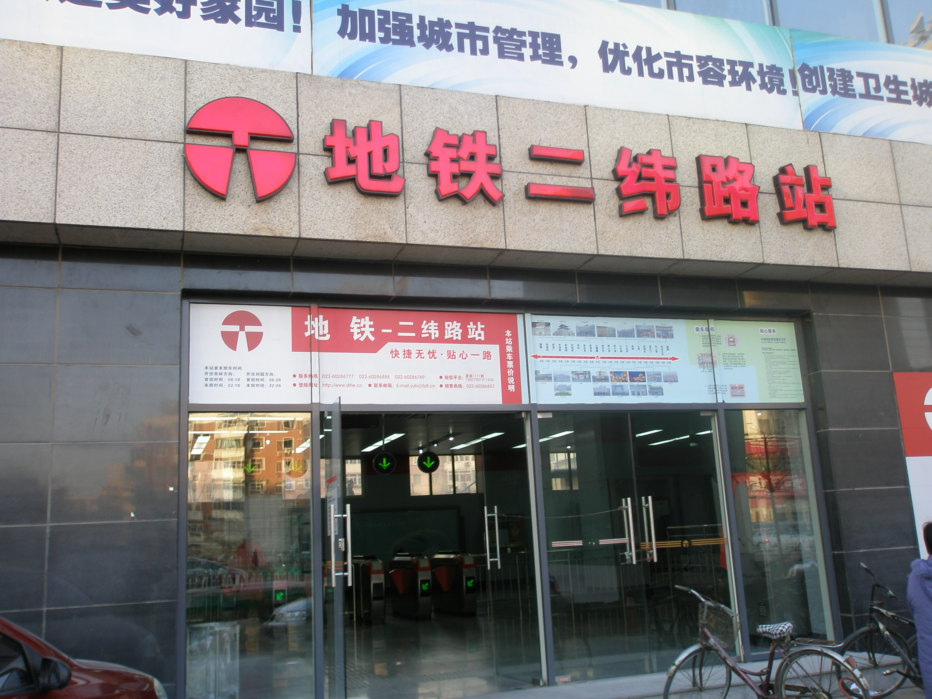 天津地铁一号线二纬路站